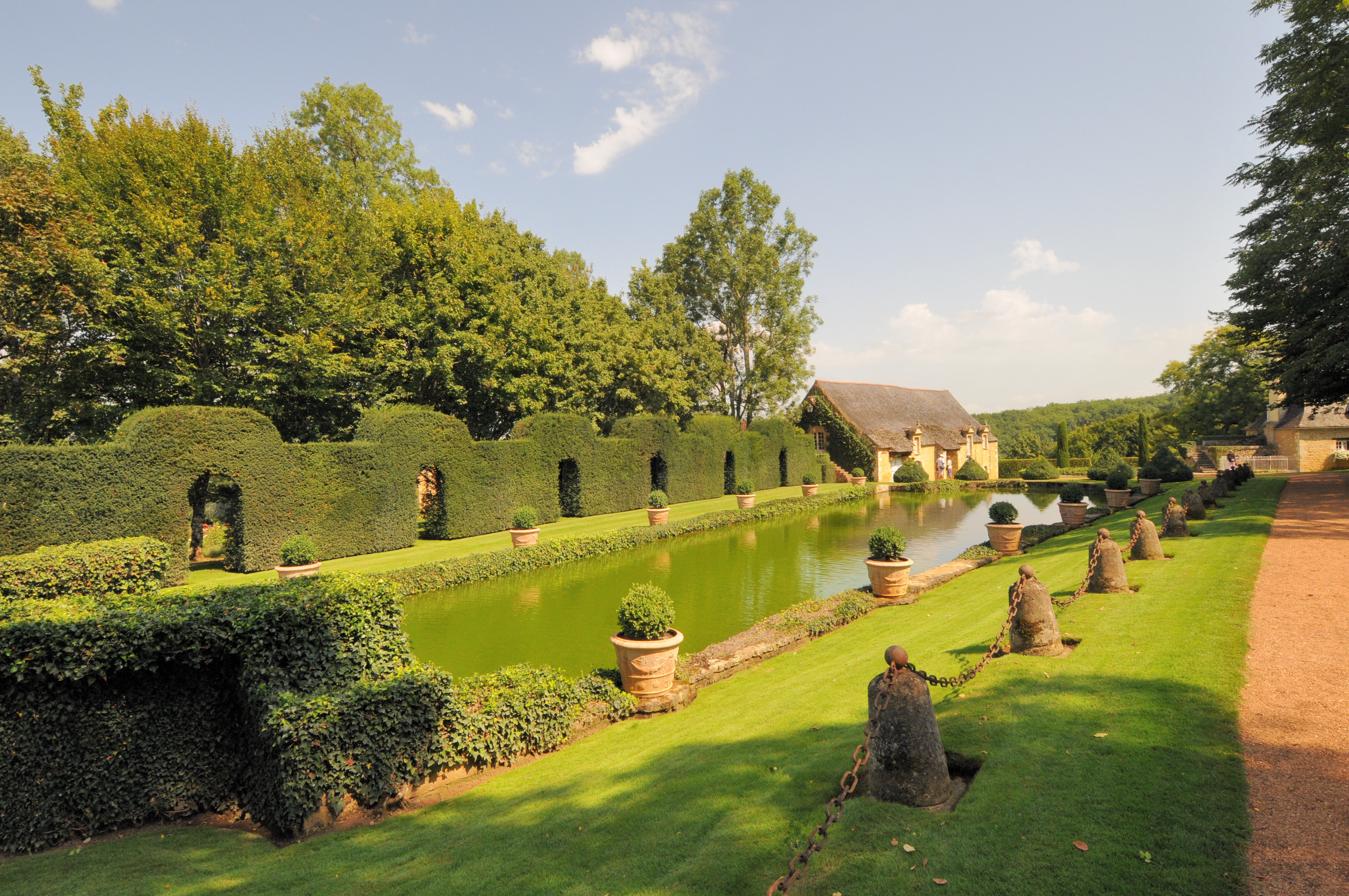 Les Jardins du Manoir D Eyrignac Perigord